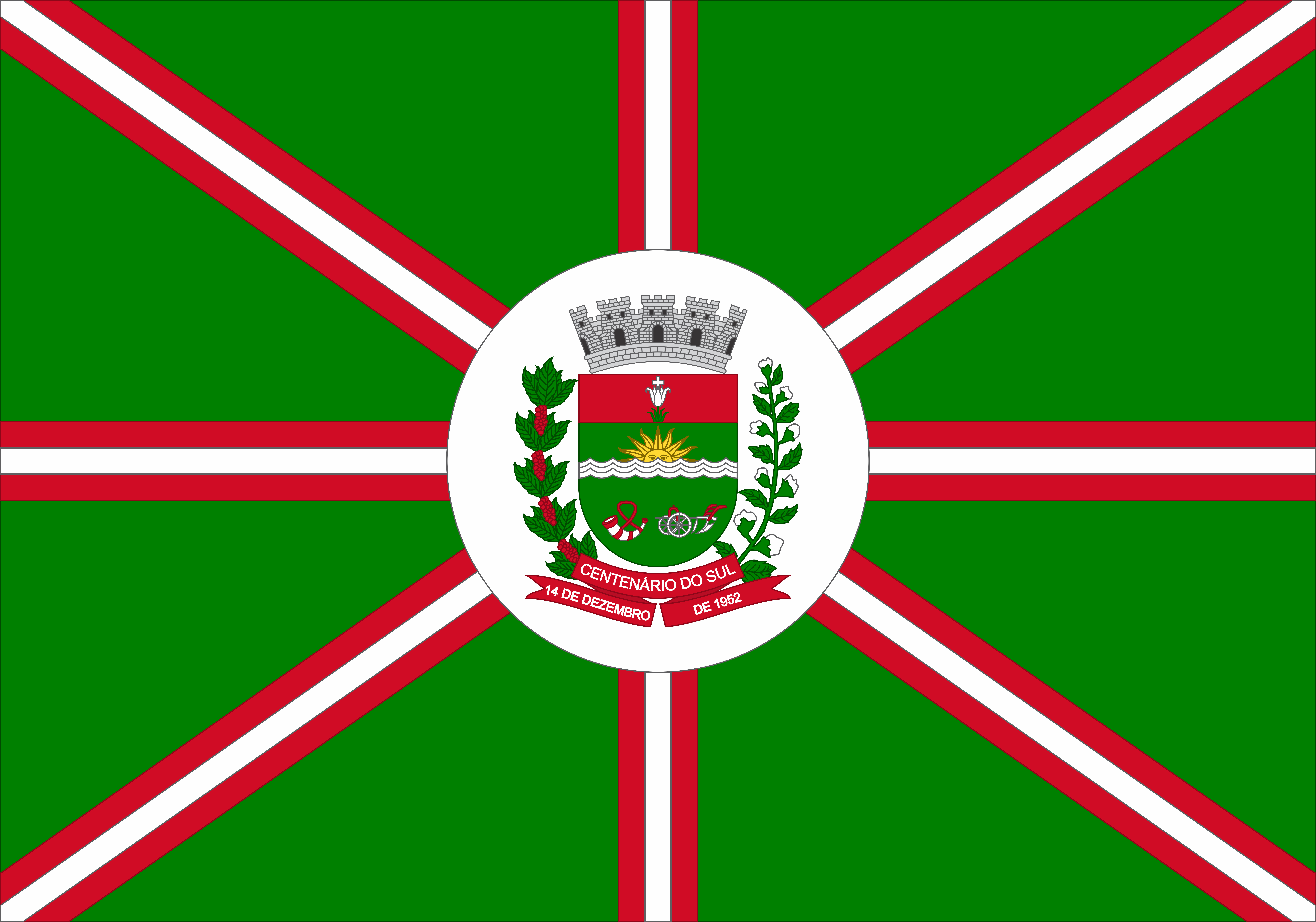 Bandeira do Município de Centenário do Sul/PR